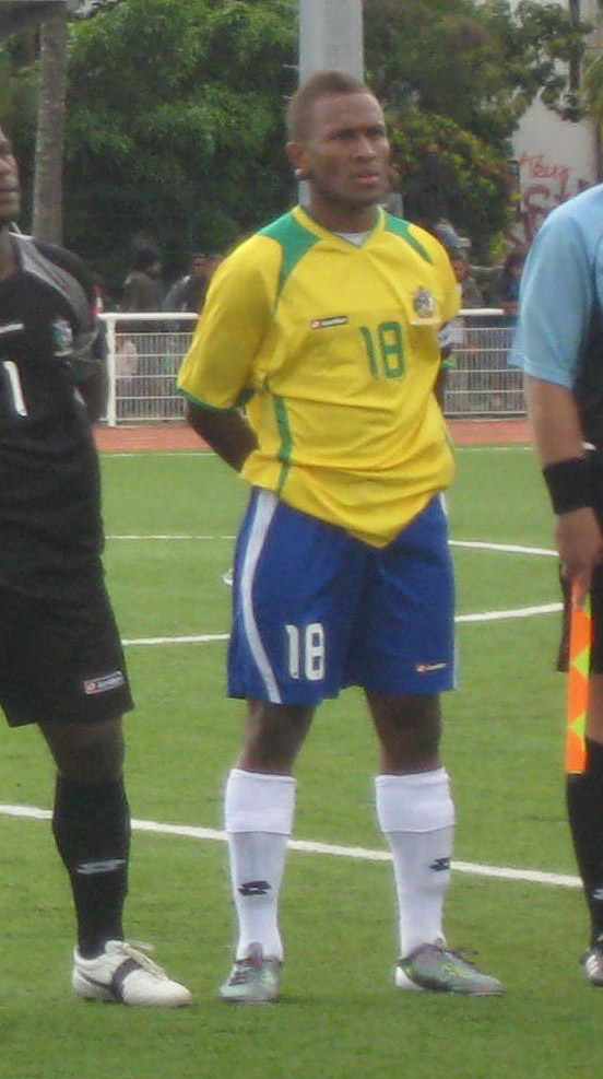 Футболист